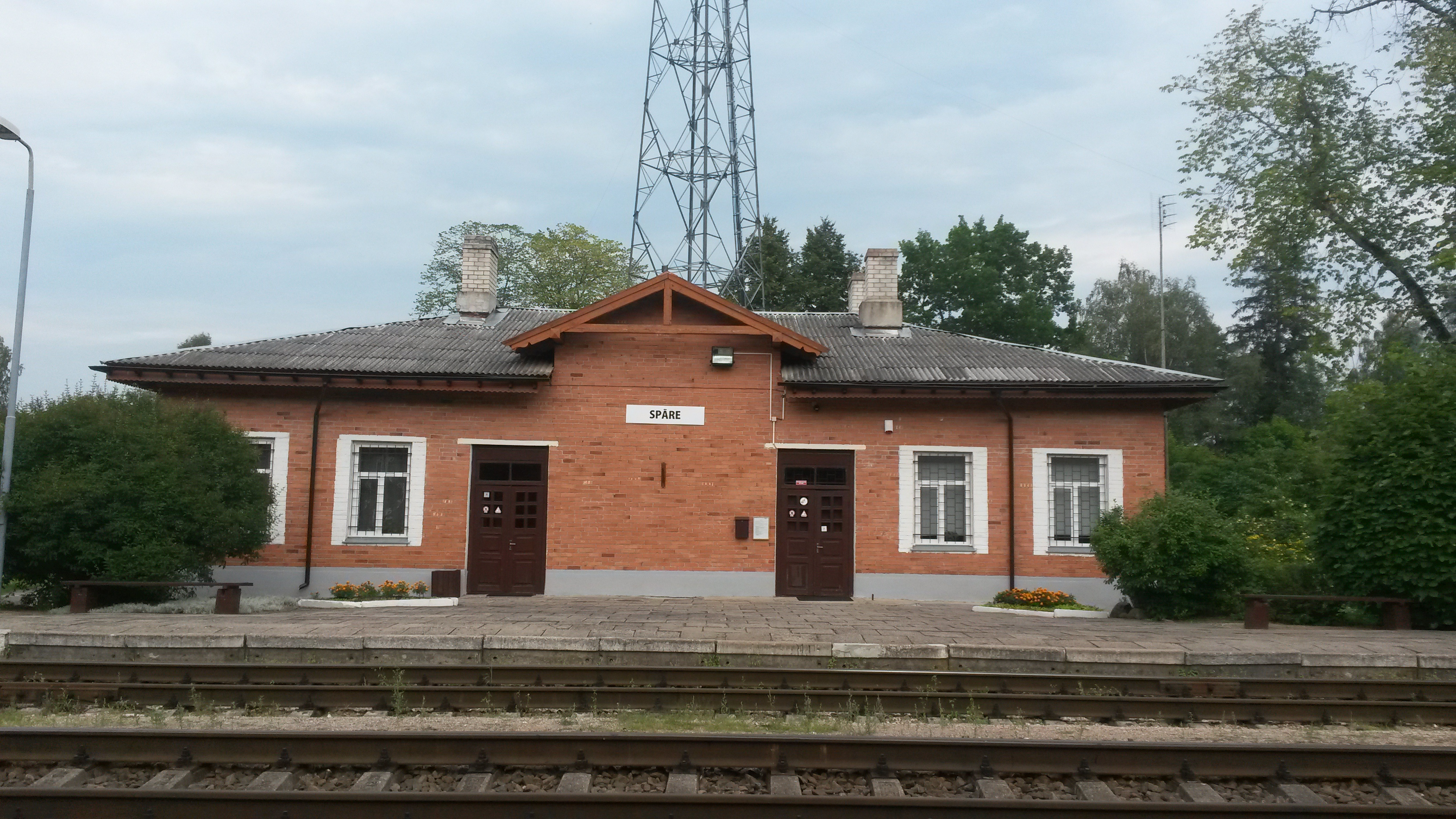 Spāres stacija.